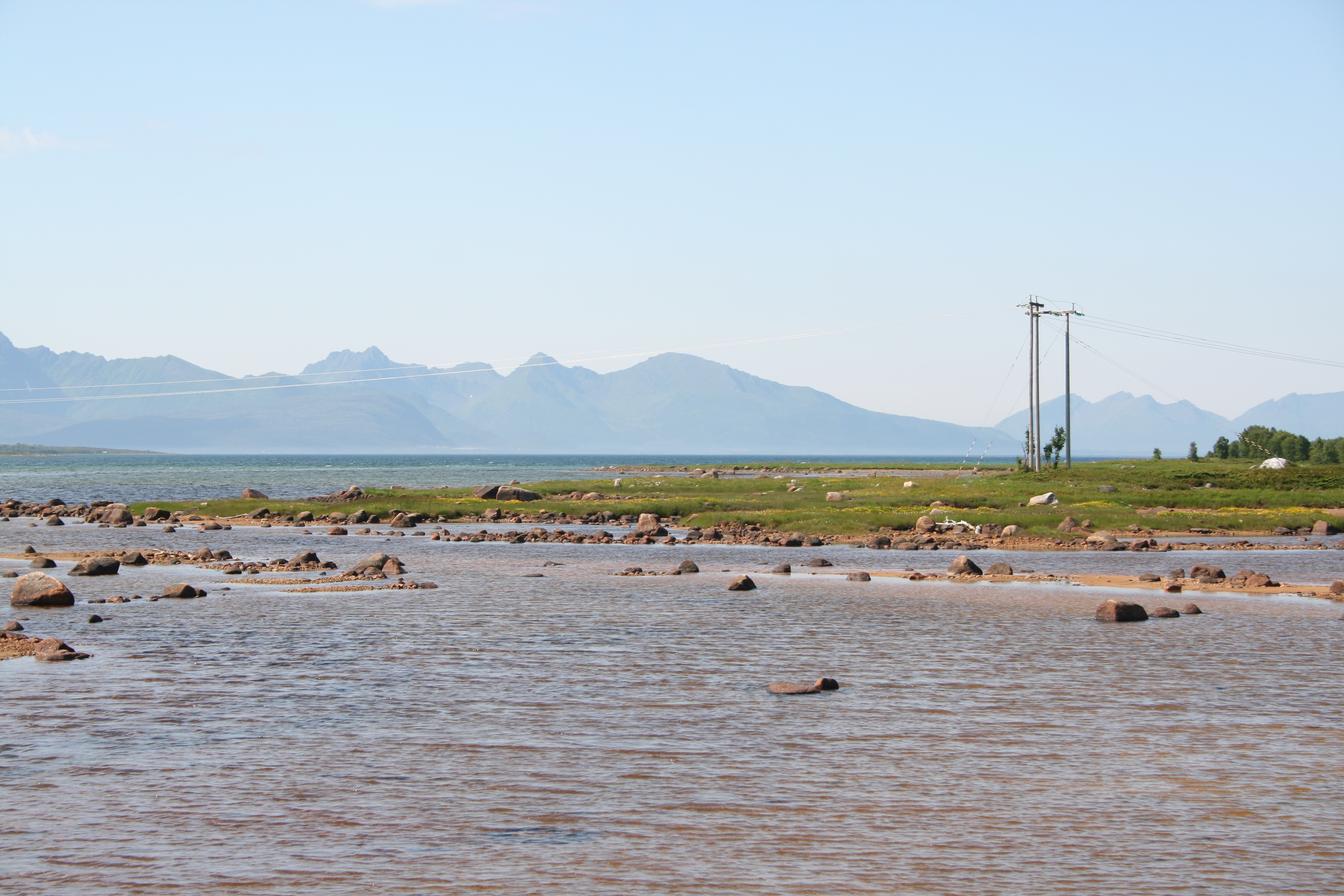 Kraftlinje krysser den indre delen av Forfjorden på grensa mellom Sortland og Andøy